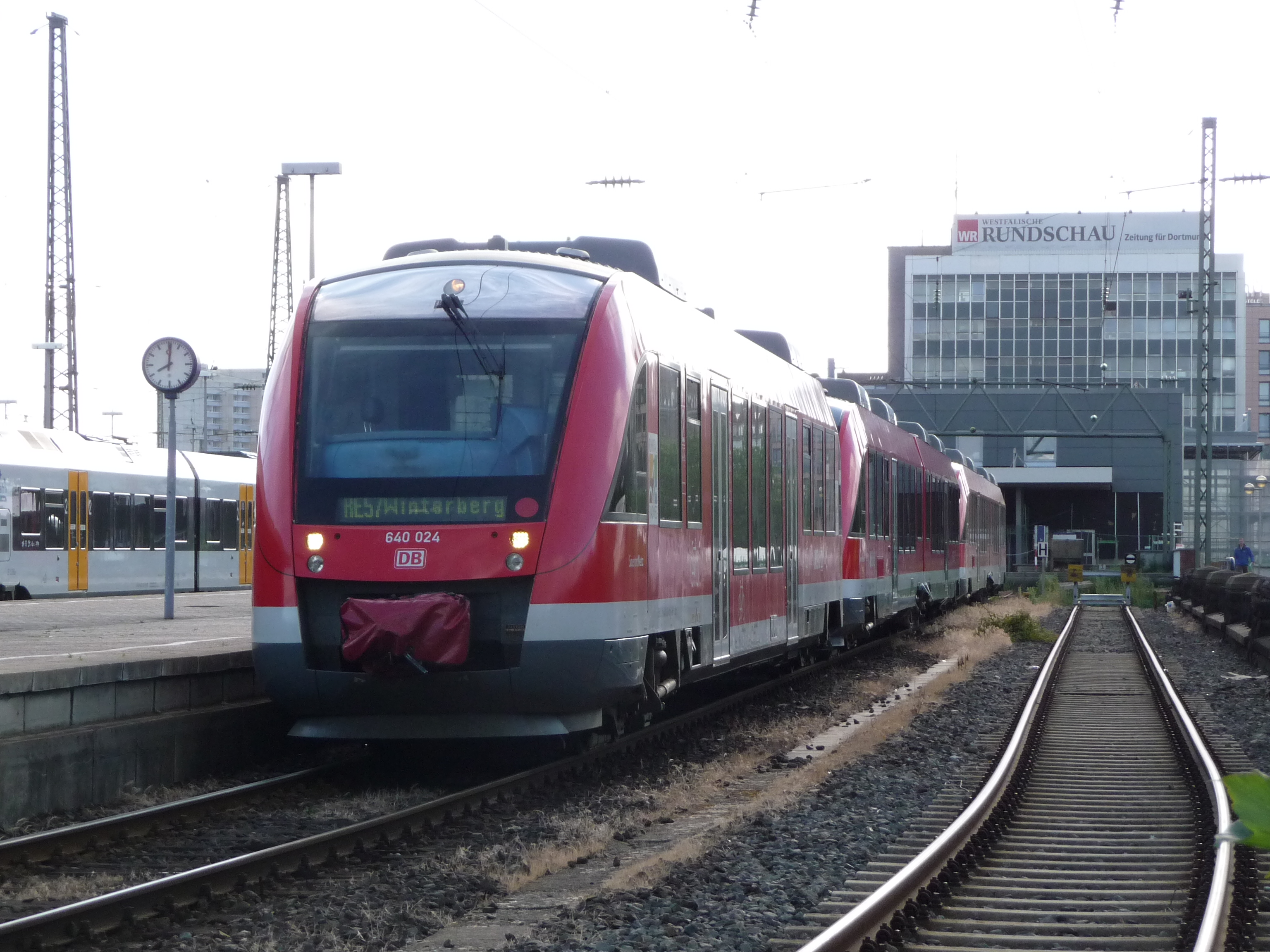 Regionalexpress Dortmund - Winterberg gebildet aus 640 + 648 + 648 in Dortmund Hbf am 19.07.2010